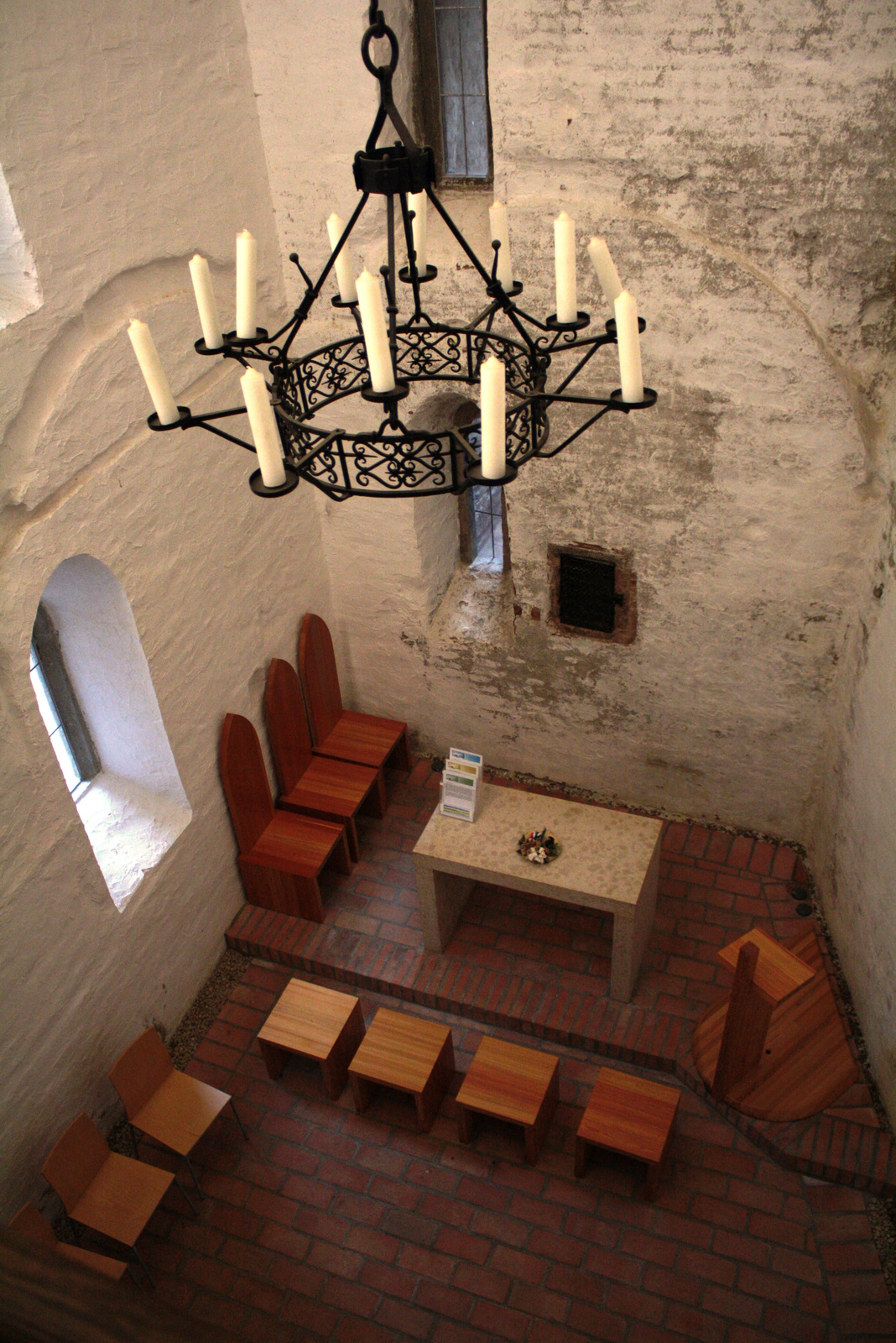 Vár (Gyula, Várfürdő út (Szigeterőd, Belső vár)) This is a photo of a monument in Hungary. Identifier: 2485